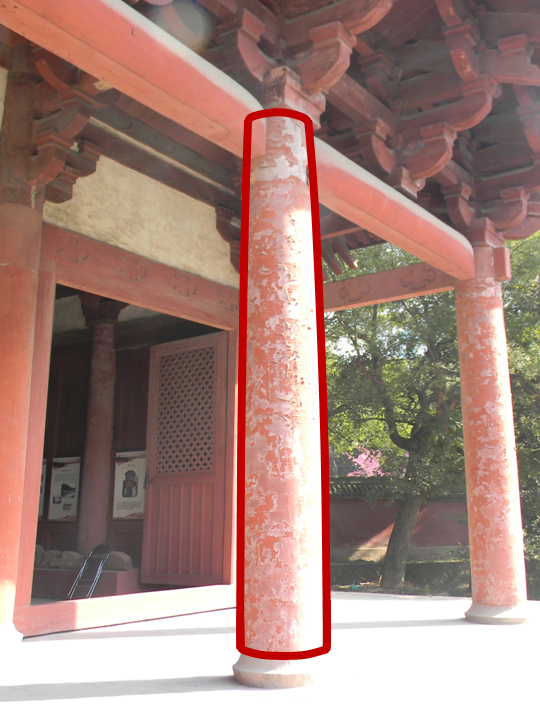 华林寺殿柱